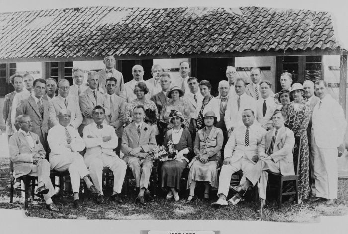 foto. Portret van Dick de Hoog, voorzitter van het Indo-Europees Verbond, met docenten die werkzaam zijn op door het IEV opgerichte scholen